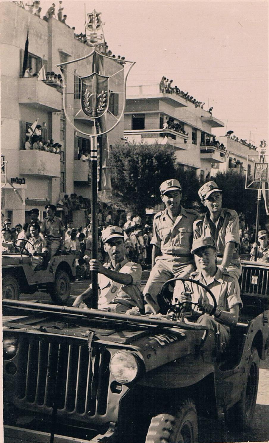 מצעד צה"ל בתל -אביב. בתמונה ג'יפ של גבעתי ודוד סגל חייל גבעתי מחזיק את סמל חטיבת גבעתי